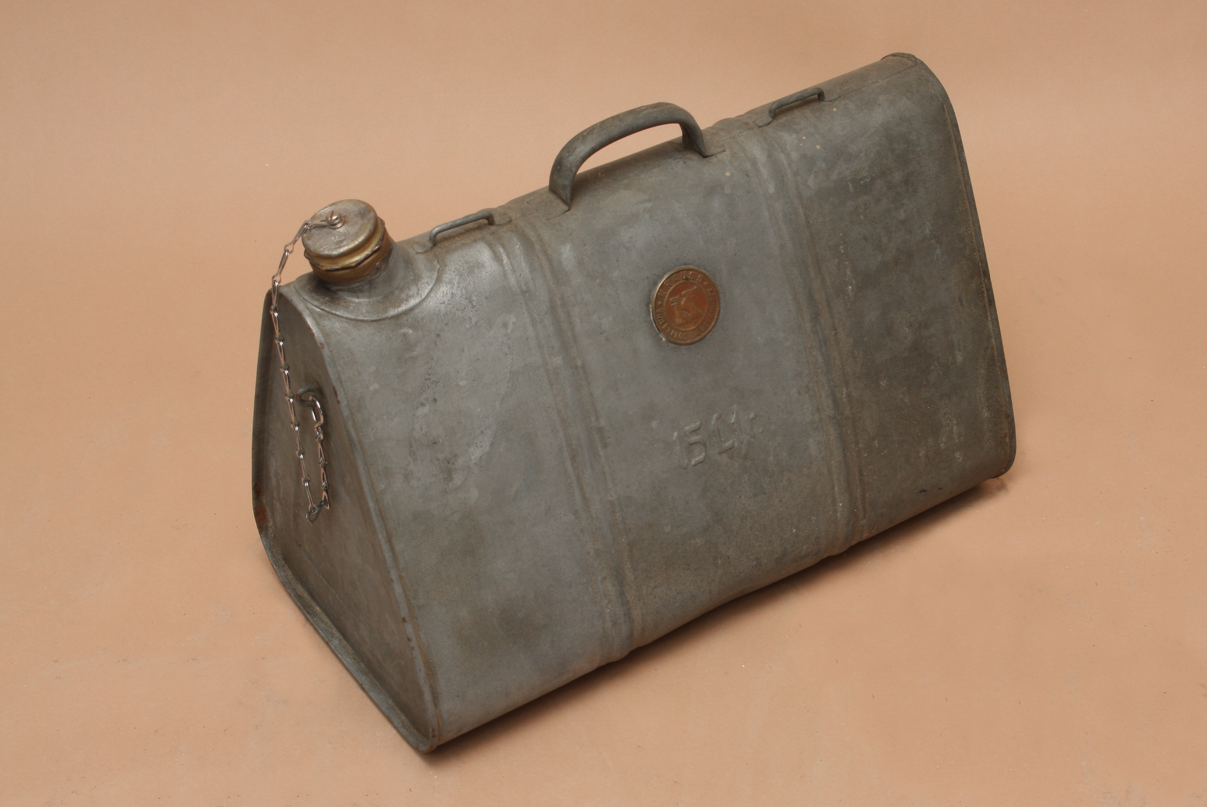 Dreieckskanister (Hersteller: Fa. Krauss, Schwarzenberg/Erzgeb.)